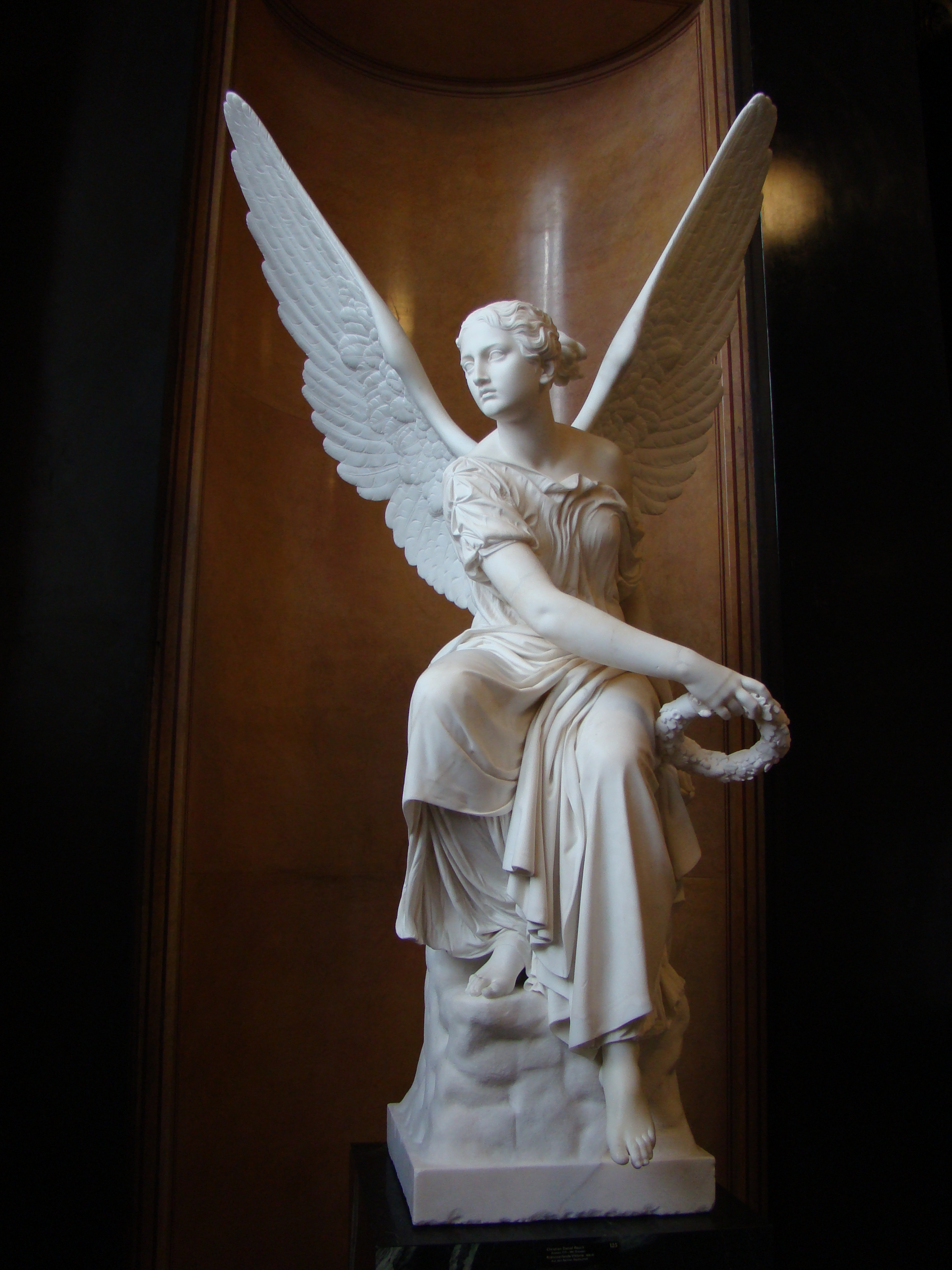 Kranzwerfende Viktoria (1838–45), Marmorstatue von Christian Daniel Rauch († 3. Dezember 1857), Alte Nationalgalerie, Berlin, ursprünglicher Standort: Berliner Stadtschloss